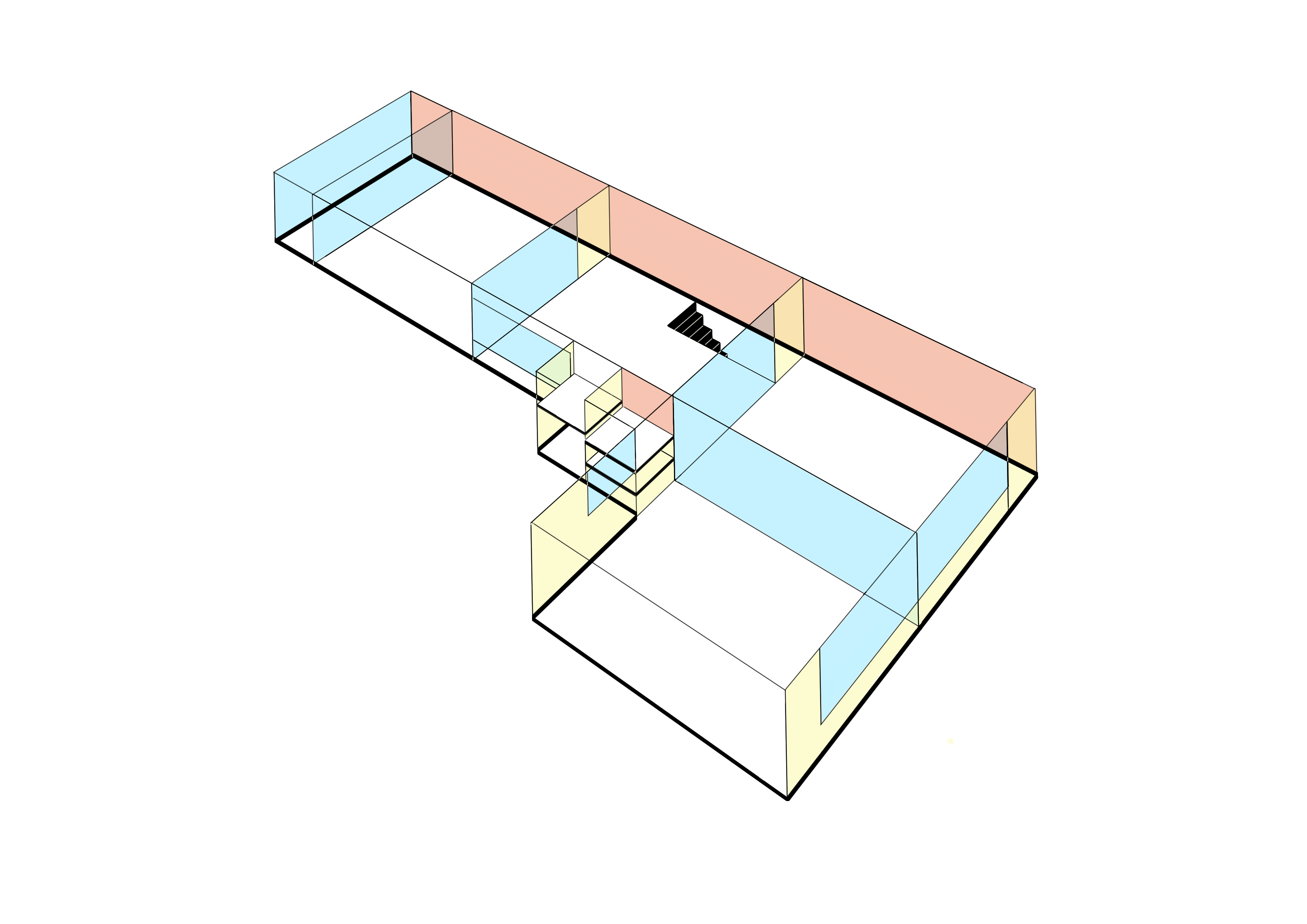 2階俯瞰図